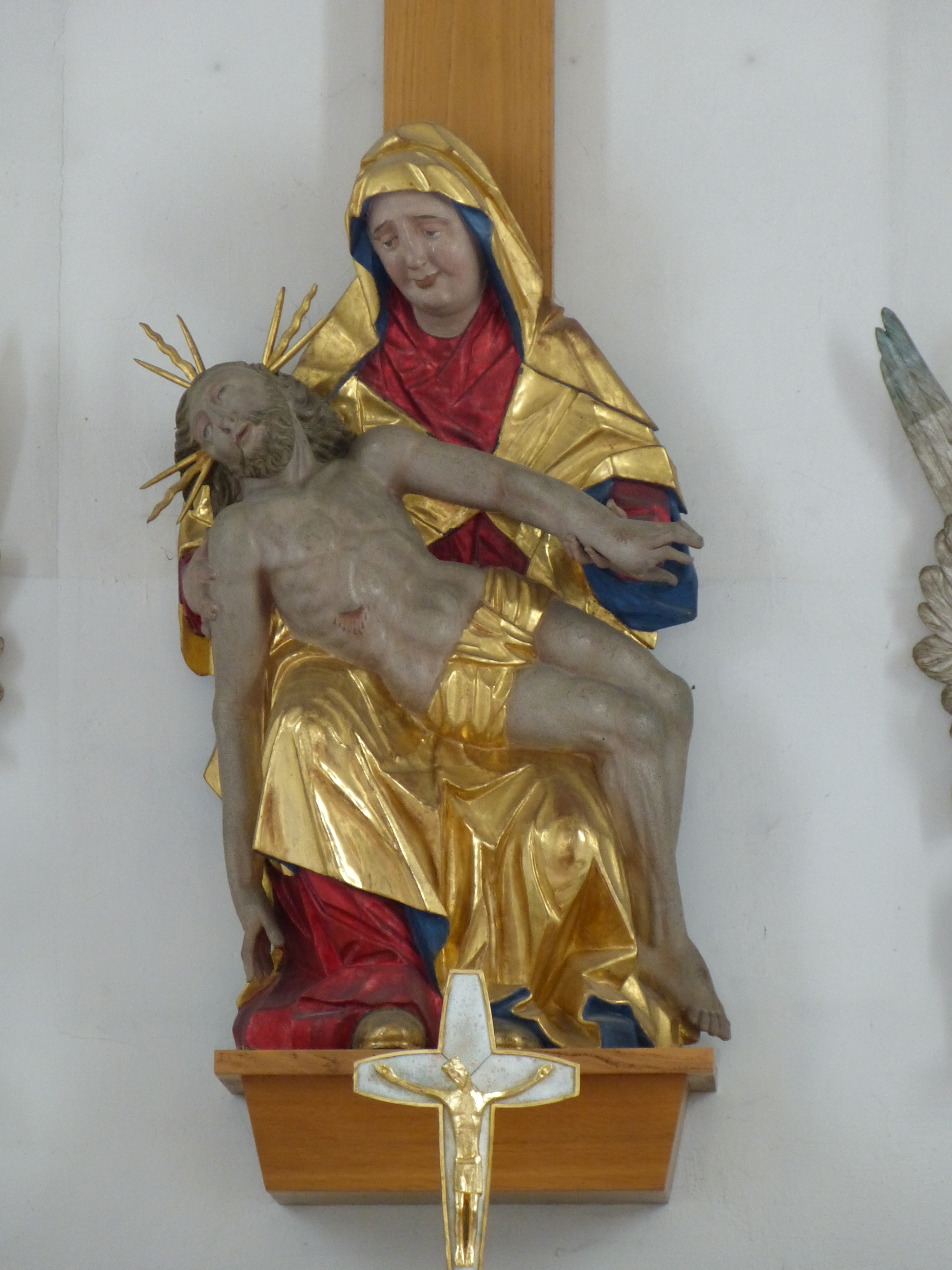 St. Nikolaus, Schrattenbach, Landkreis Oberallgäu, Bayern